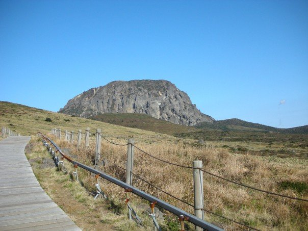 Hallasan, Jeju-do, South Korea.